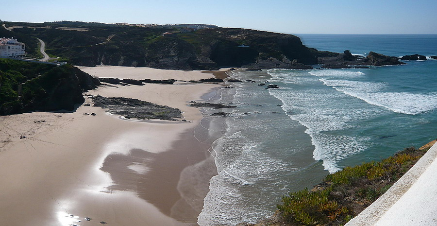 plage de Zambujeira do Mar